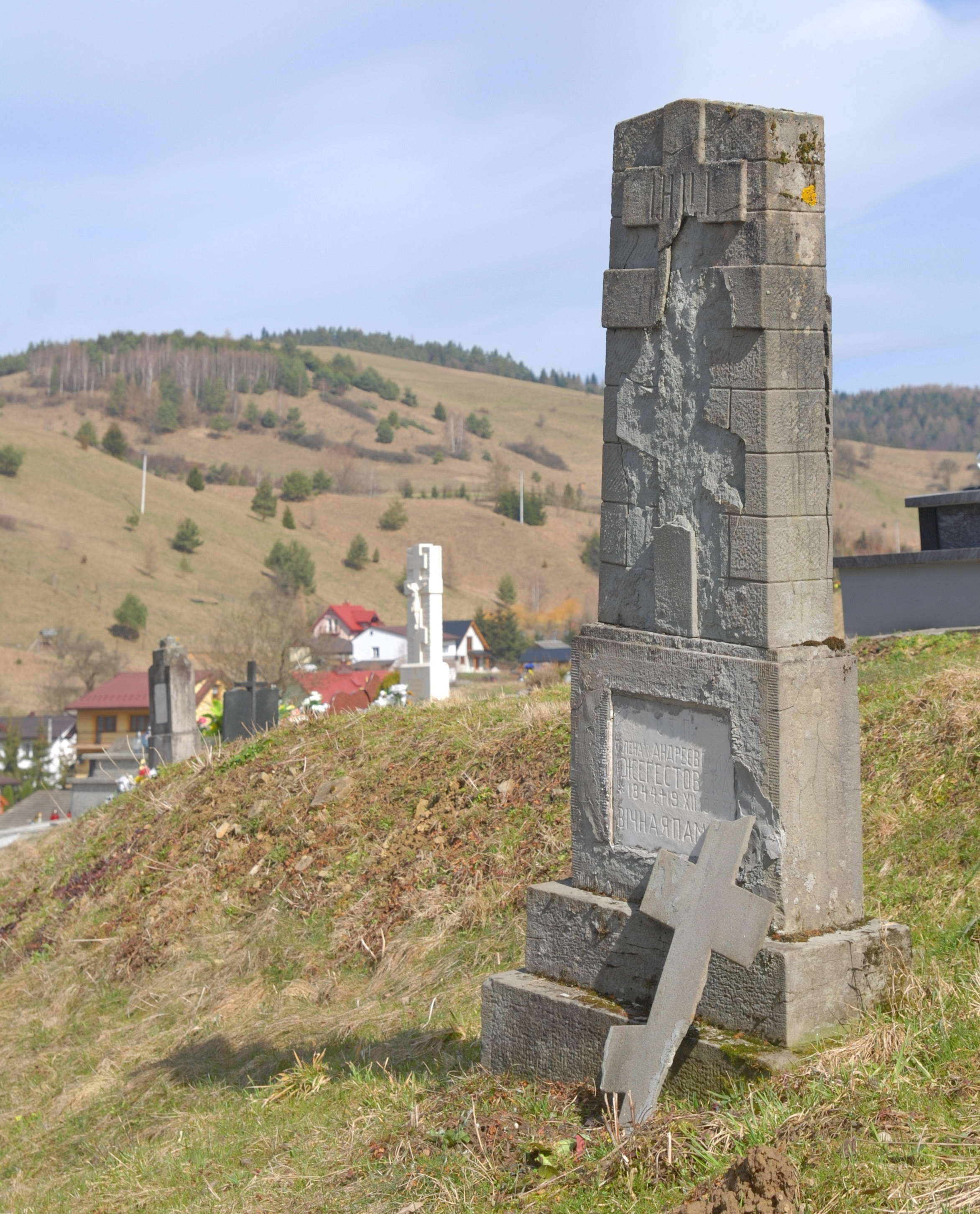 wieś Milik